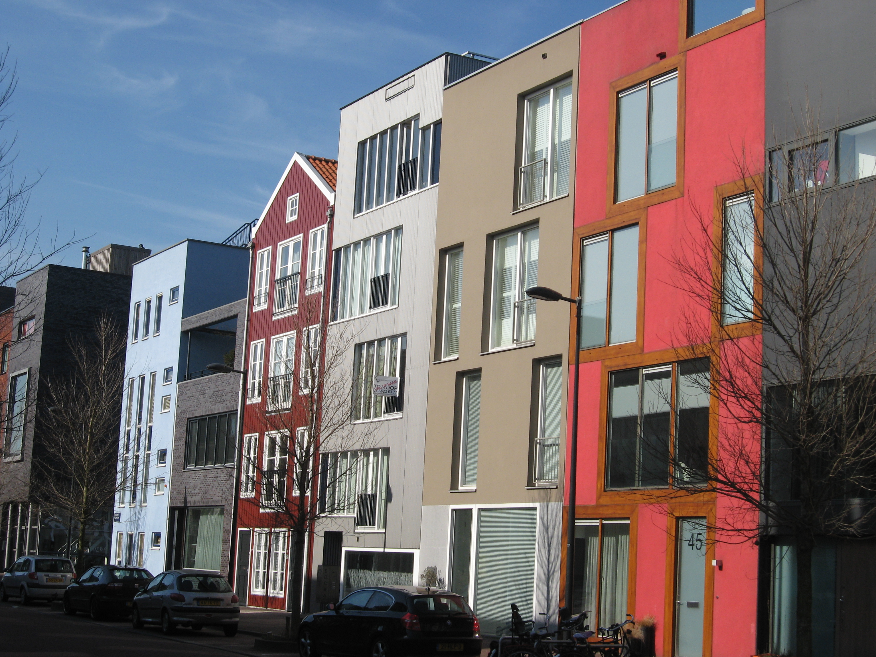 Steigereiland Homes